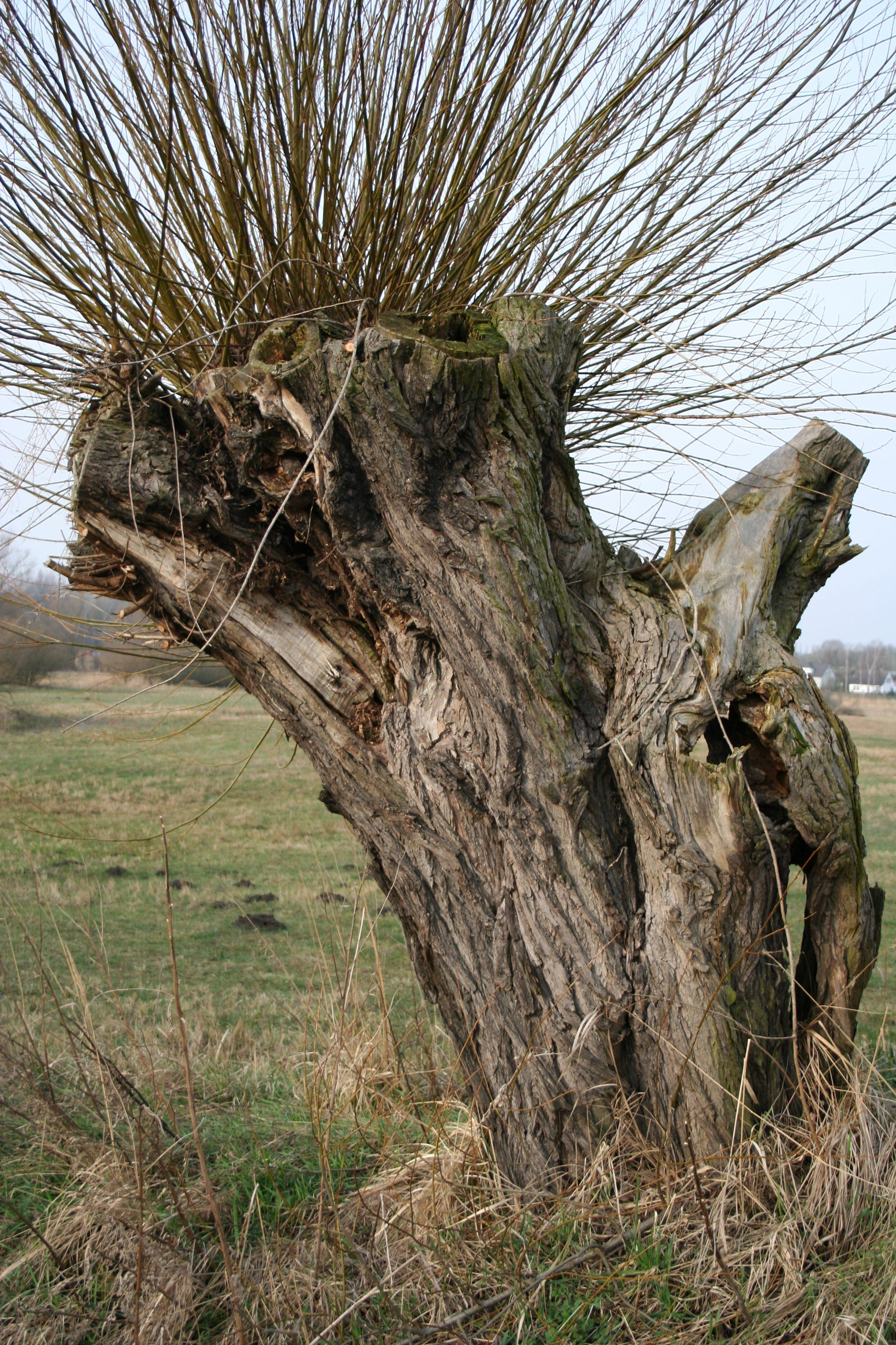 Eine Kopfweide auf den Oderwiesen nördlich von Frankfurt an der Oder, Bereich Kliestow; Naturschutzgebiet „Oderwiesen nördlich Frankfurt“